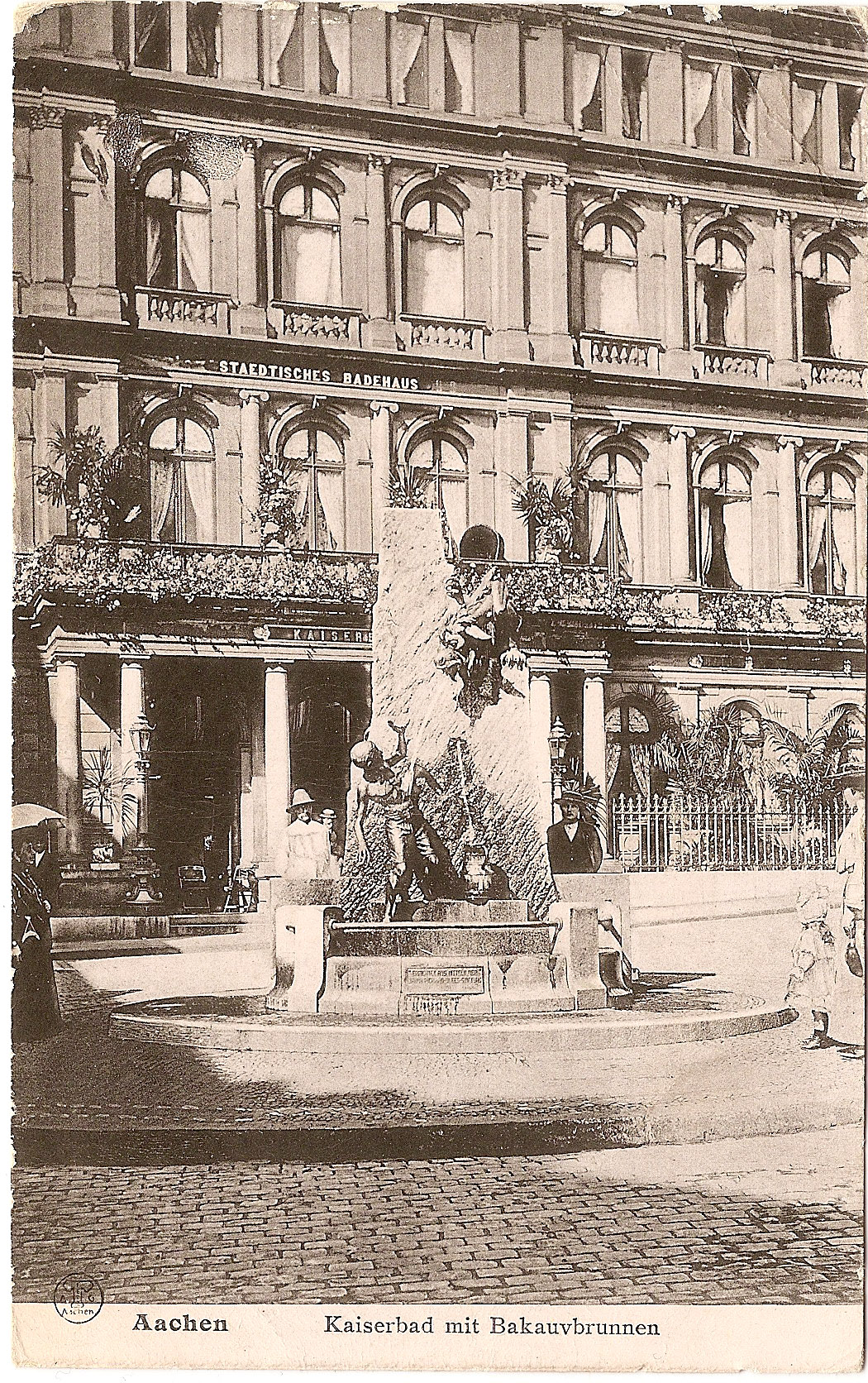 Das Kaiserbad in Aachen mit dem Bahkauv-Brunnen, ca. 1920